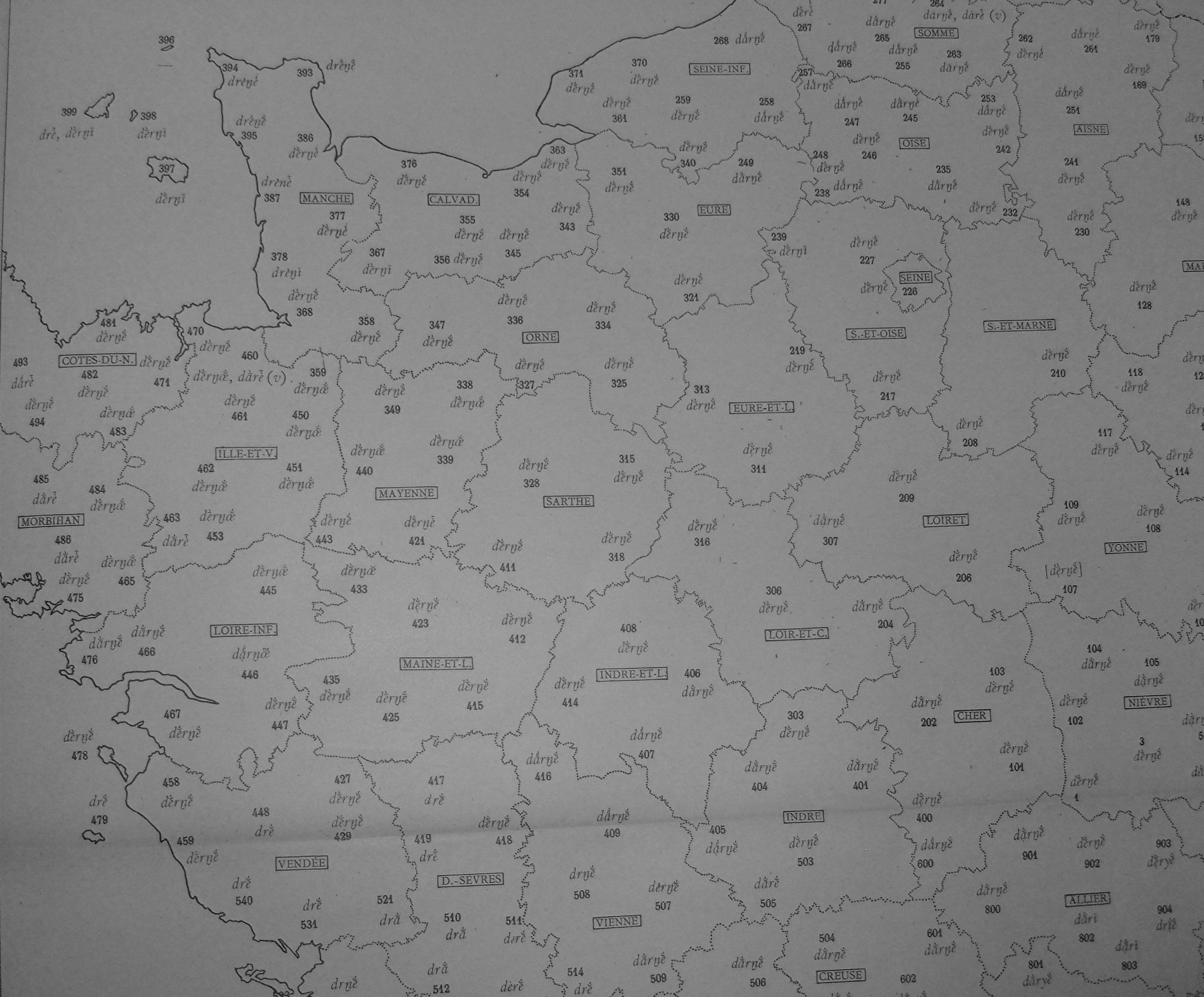 Oeuvre de plus de 70 ans 1902 atlas linguistique de france dernier